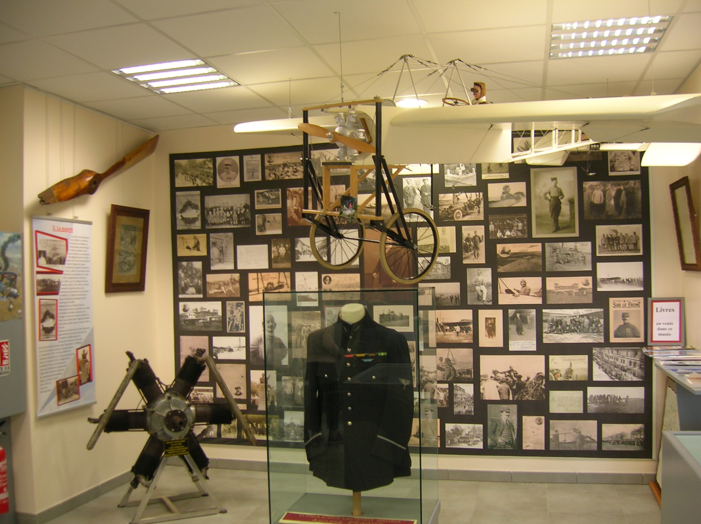 Le musée Pegoud. Journées du patrimoine 2016. Montferrat, Isère, AuRA, France.